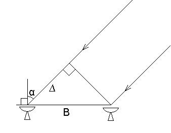 Иллюстрация к расчёту ширины главного лепестка диаграммны направленности решётки из 2-х антенн